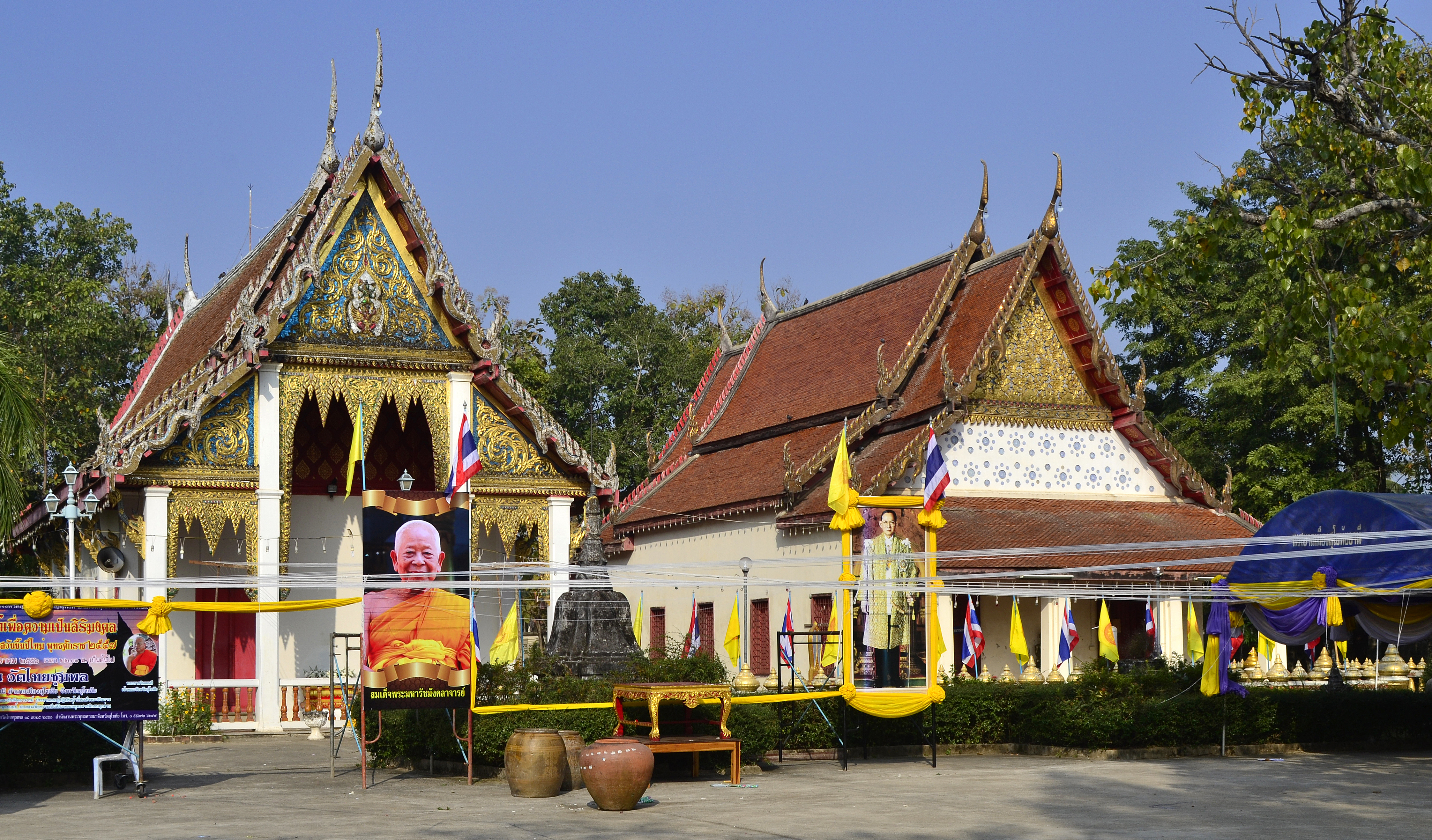 Wat Thai Chumphon in Sukhothai New Town